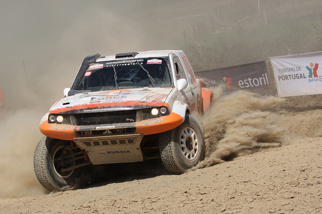 Российская команда G-Force Motorsport на этапе Кубка мира по ралли-рейдам в Португалии. VODAFONE TRANSIBERICO RALLY 2009